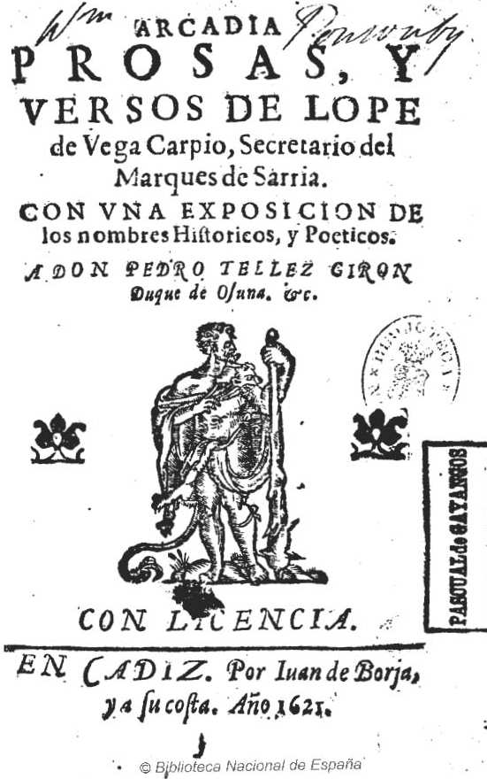 Arcadia : prosas y versos de Lope de Vega Carpio ... ; con vna exposicion de los nombres históricos y poéticos ... Autor: Vega, Lope de (1562-1635) Fecha: 1621 Datos de edición: En Cadiz, Por Iuan de Borja, y a su costa